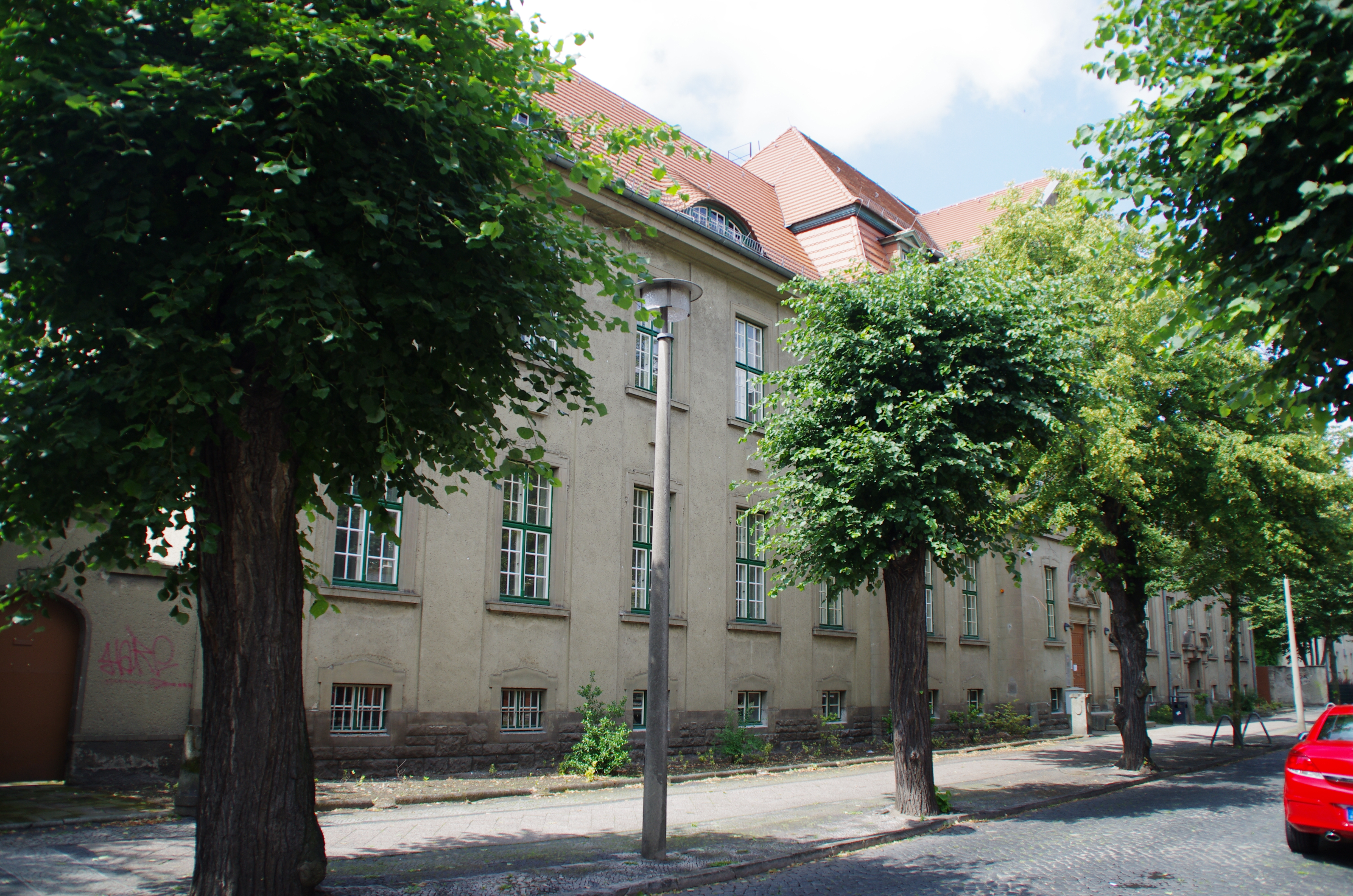 Luckenwalde in Brandenburg. Das Gebäude beherbergt das Amtsgericht. Es steht unter Denkmalschutz.